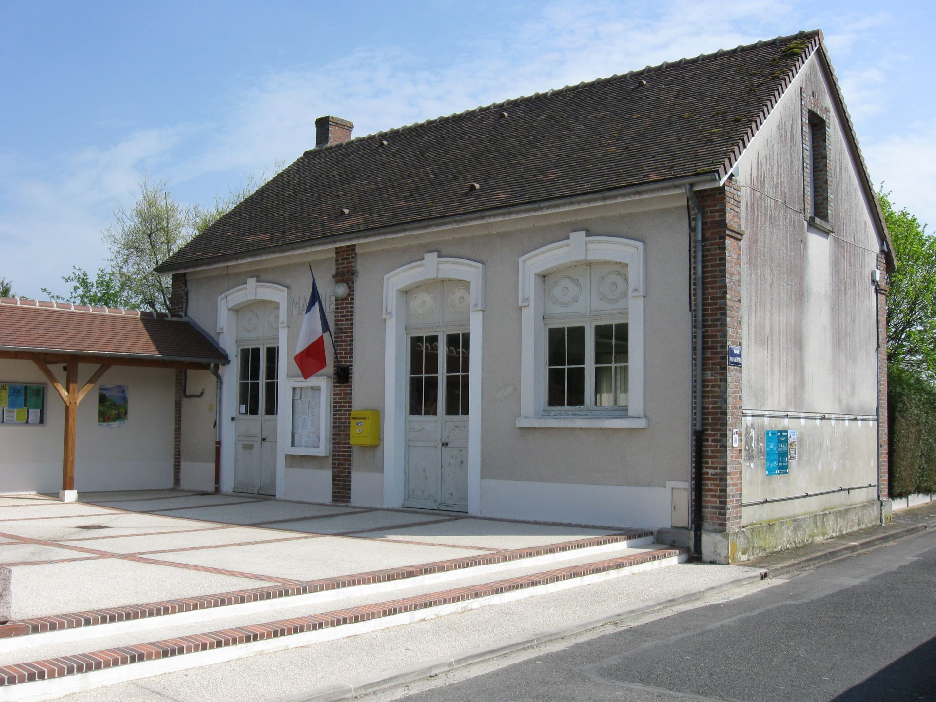 Mairie de Gravon. (Seine-et-Marne, région Île-de-France).